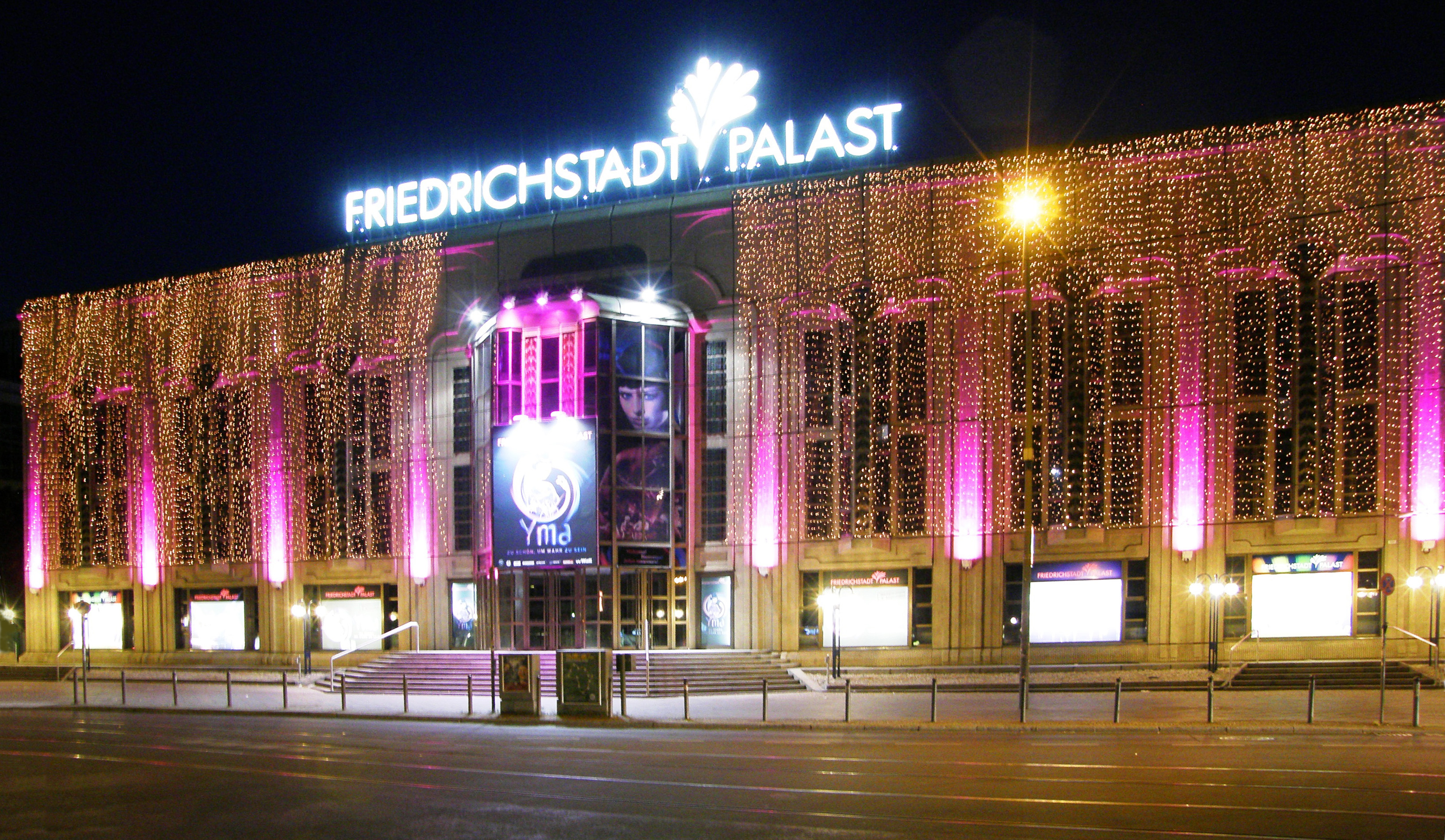 Friedrichstraße